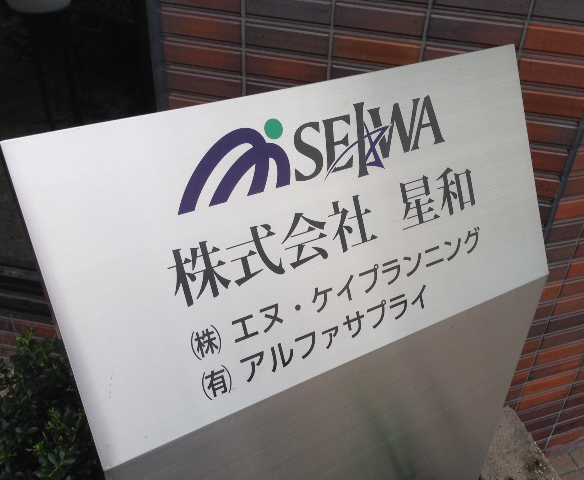 本社 看板